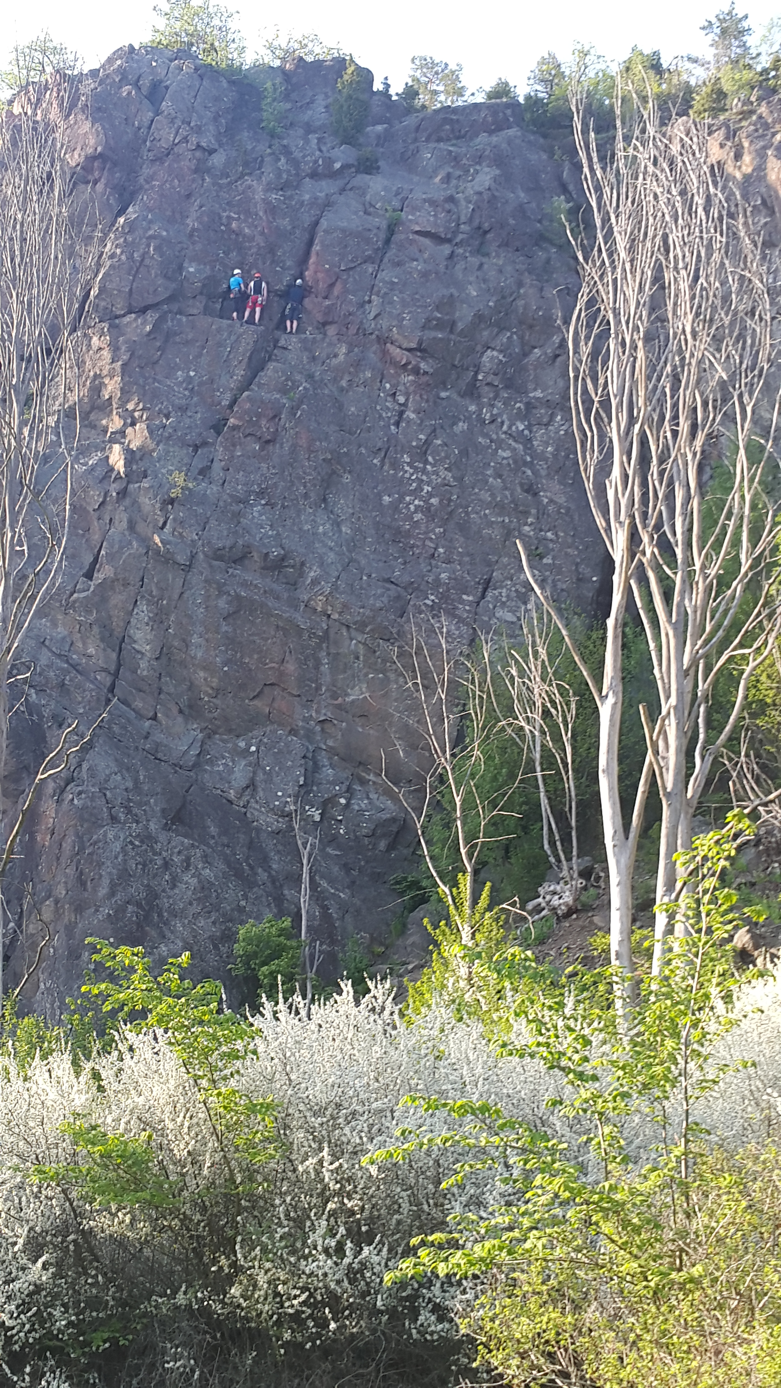 Häggsta klippklättring